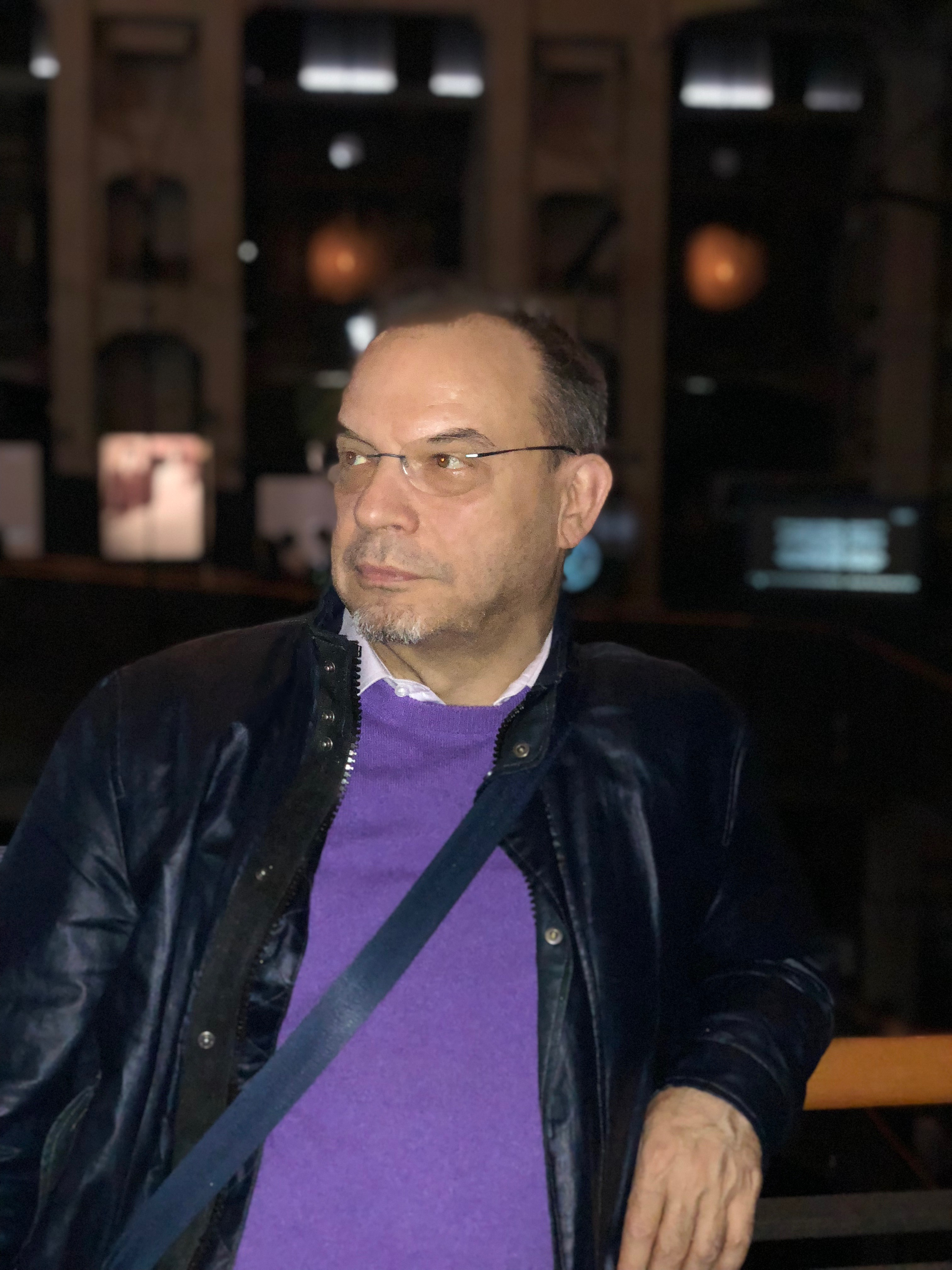 Carlo Ballarini